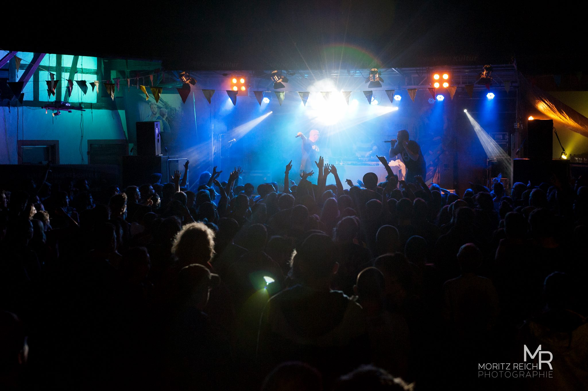 Audio88 & Yassin Abends auf der Hofbühne